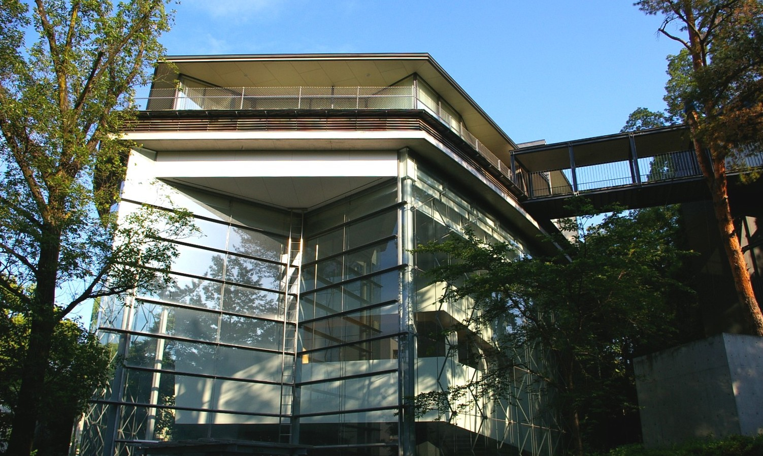 愛知県名古屋市